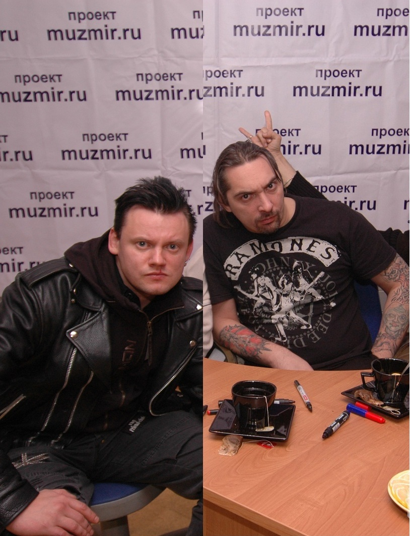 Сыктывкар, магазин «Музыкальный мир», 20 ноября 2007